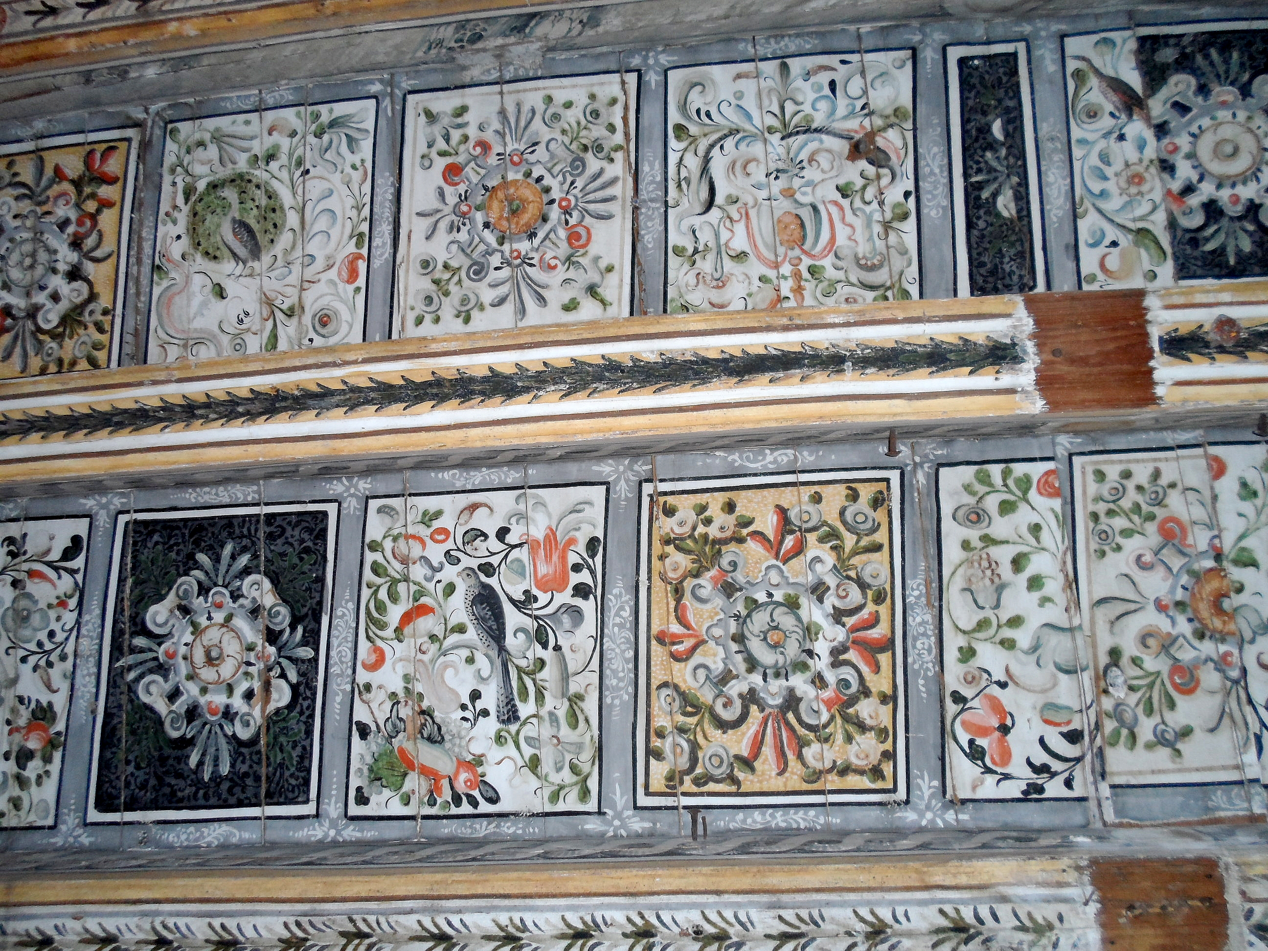 Piotrowice Nyskie, pałac (dec. dwór) (nr 54/1), 1660, 1829, 1930